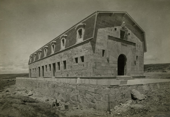 Fotografía, copia positiva. Parador de Gredos en construcción.